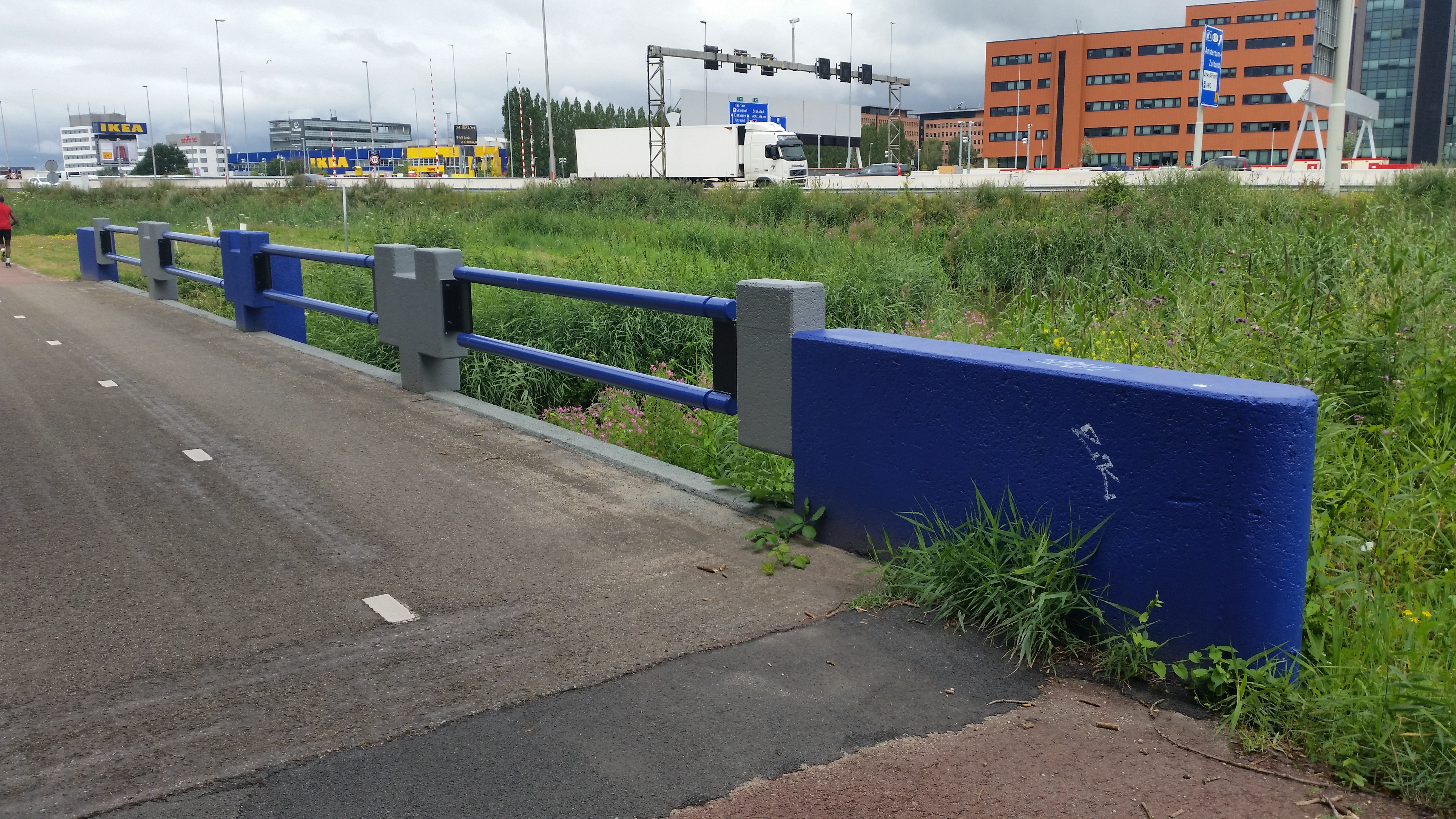 Leuning van Brug 876 (in Amsterdam)